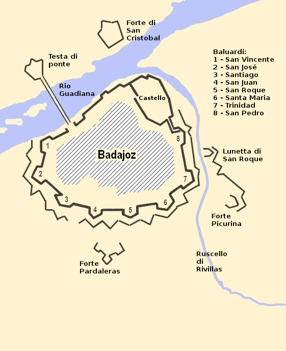 Assedio di Badajoz dal 26 gennaio all'11 marzo 1811.